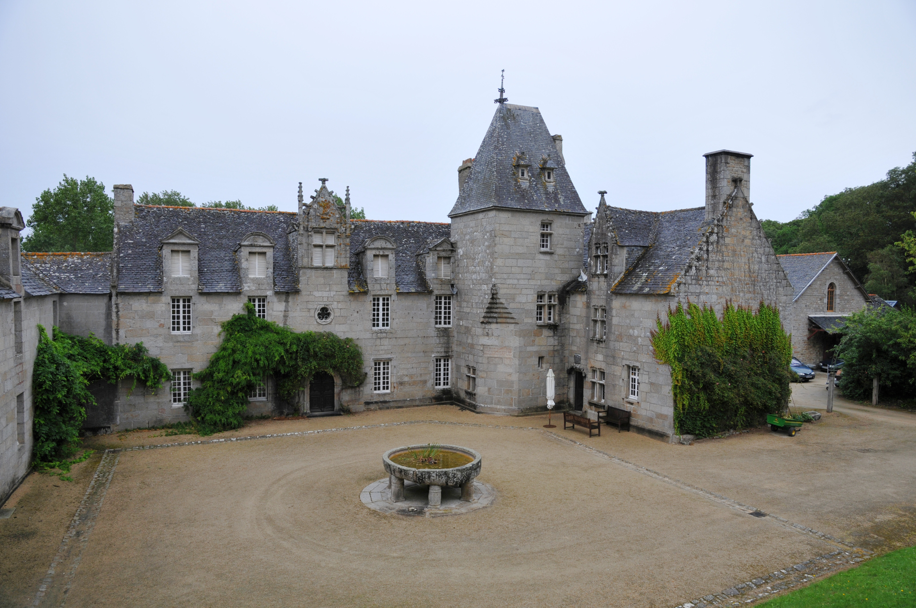 Manoir de Tronjoly in Cléder, Finistère, Frankreich